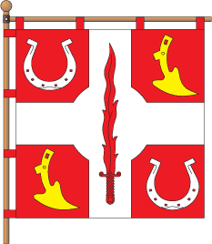 Прапор Ганнопільської сільської громади